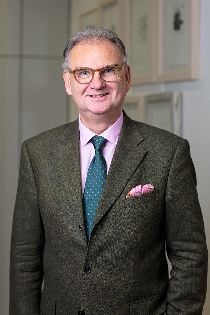 W. Wolfgang Fleischhacker